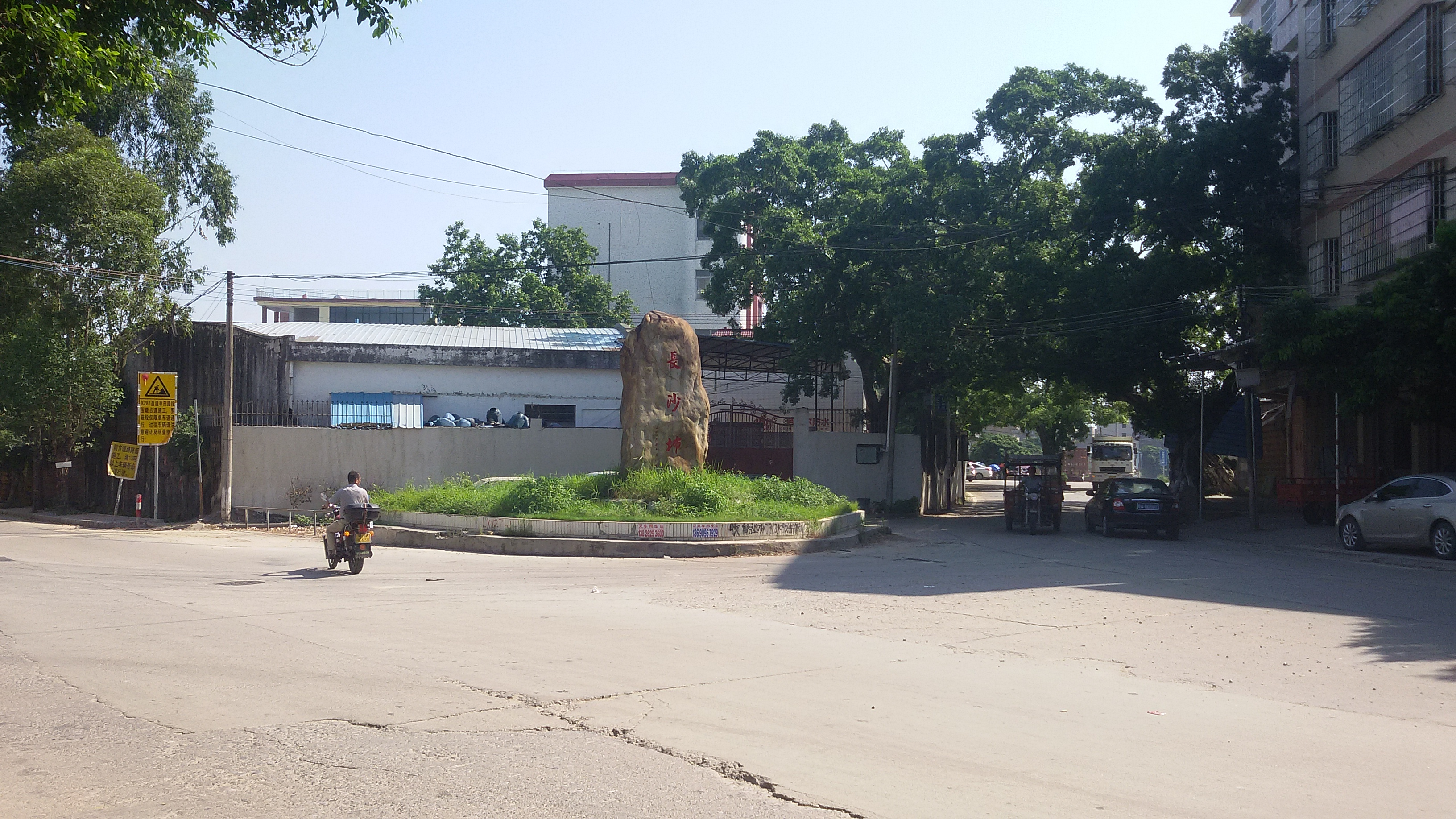 粵語: 廣州市白雲區長沙㘵村